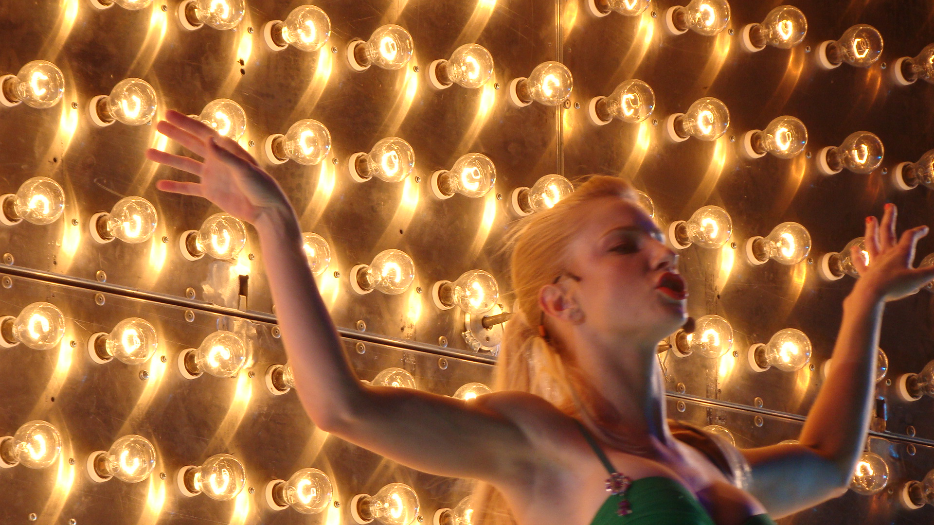 I'm A Slave 4 U